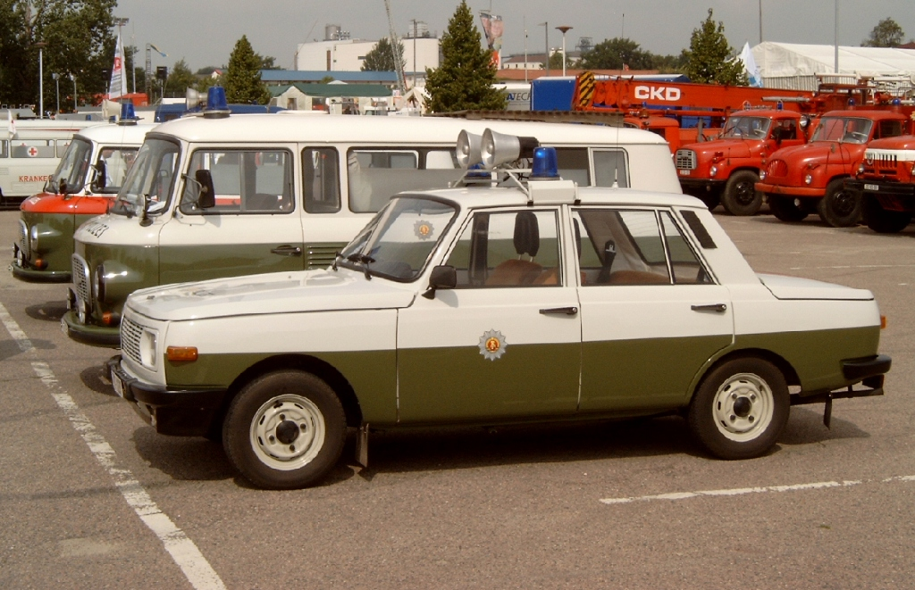 Fuhrpark der Volkspolizei mit der amtlichen Lackierung bis 10.03.1990.